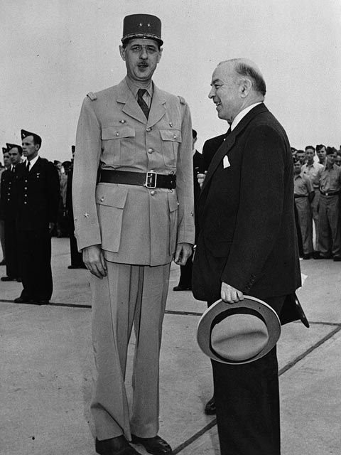 General Charles de Gaulle with Rt. Hon. W.L. Mackenzie King